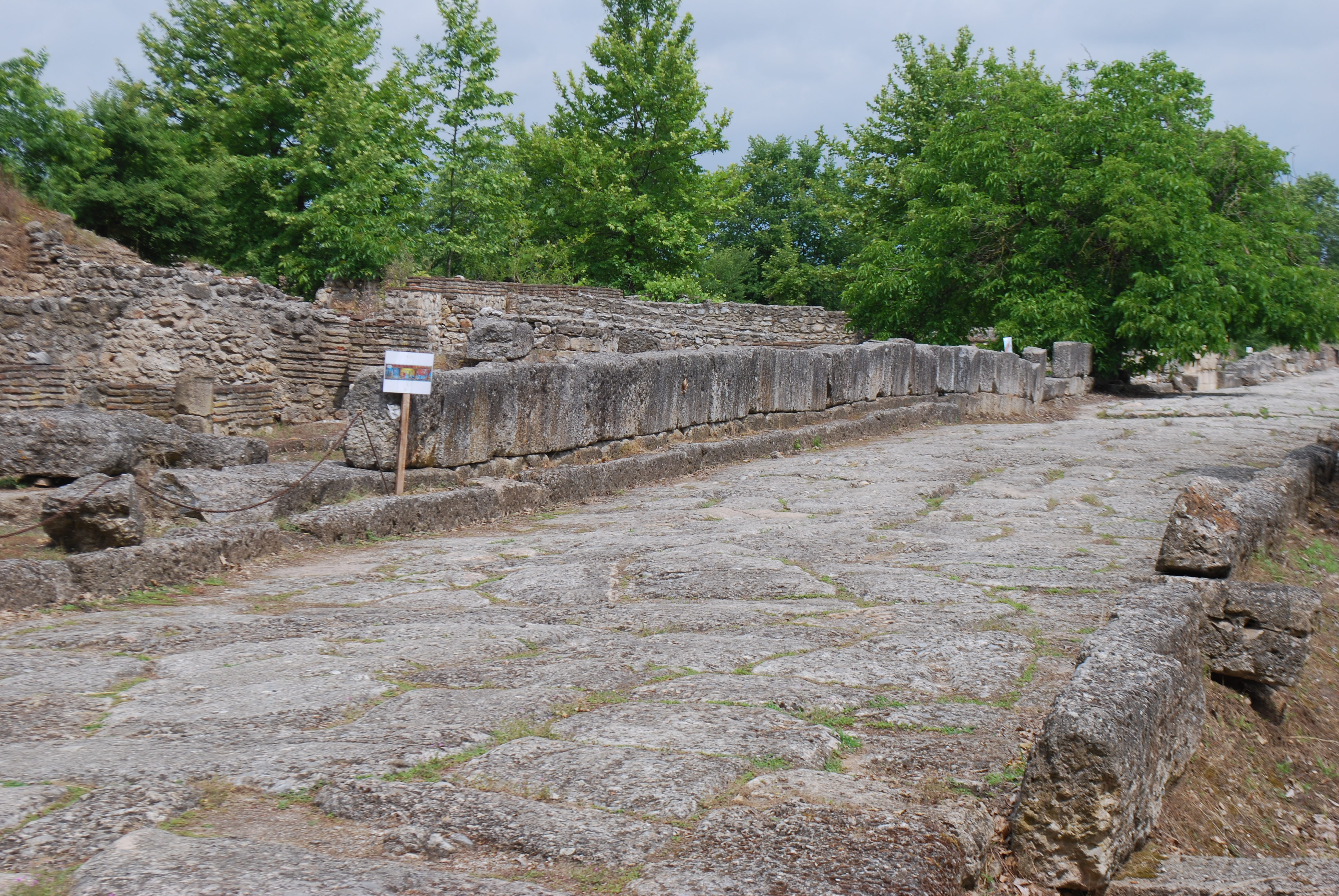 Vue du site archéologique de l'ancienne Dion, au pied du Mont Olympe (Grèce).